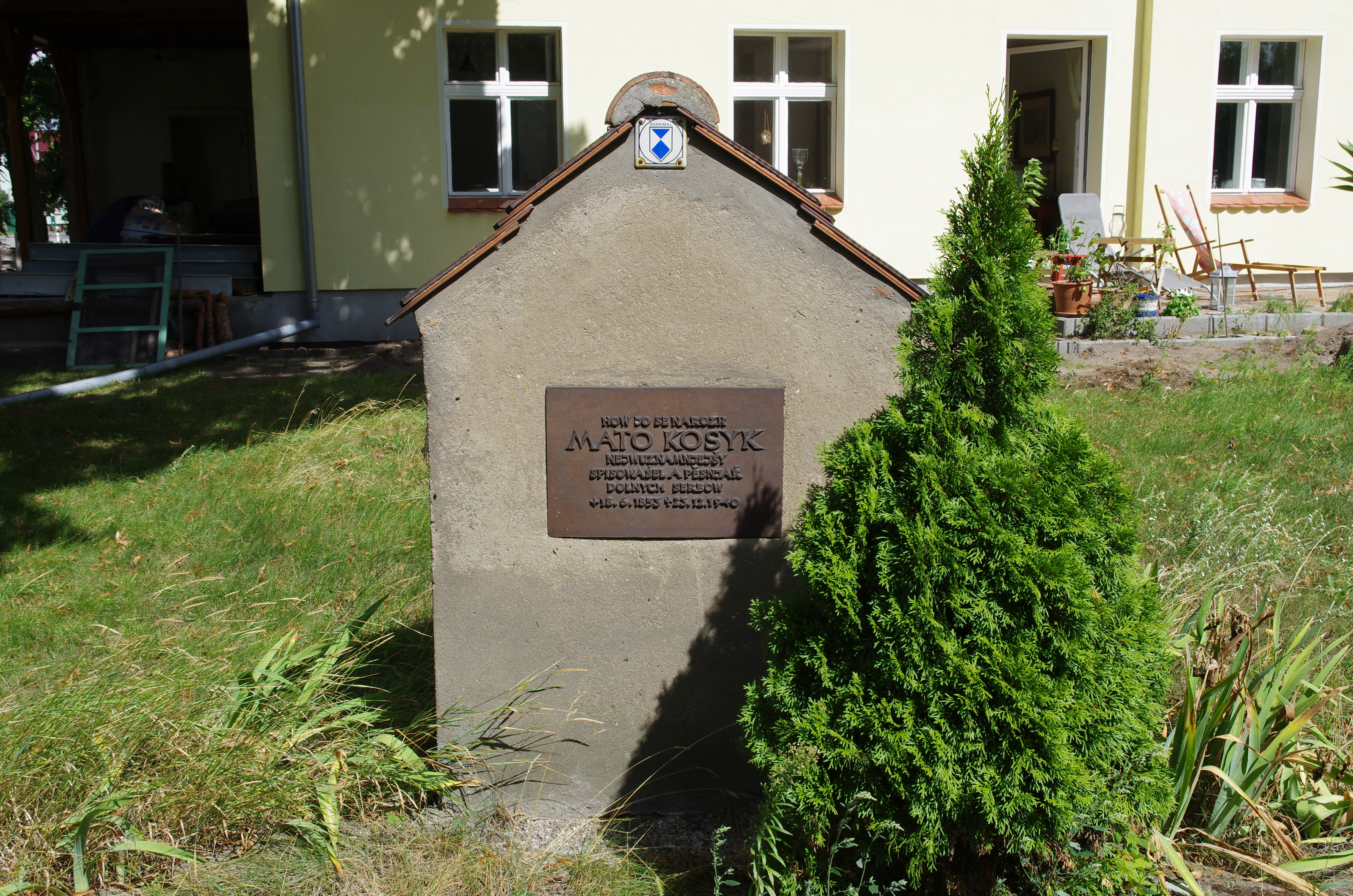 Werben (Spreewald) in Brandenburg. Der denkmalgeschützte Stein gedenkt an den niedersorbischer Dichter Mato Kosyk.